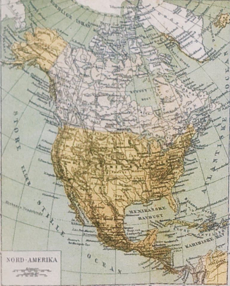 Kort over Nordamerika i Aller illustrerede Konversationsleksikon